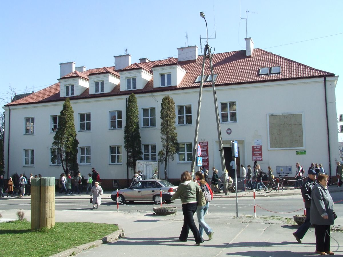 siedziba władz gminy Przasnysz i powiatu przasnyskiego ul. Kilińskiego 2